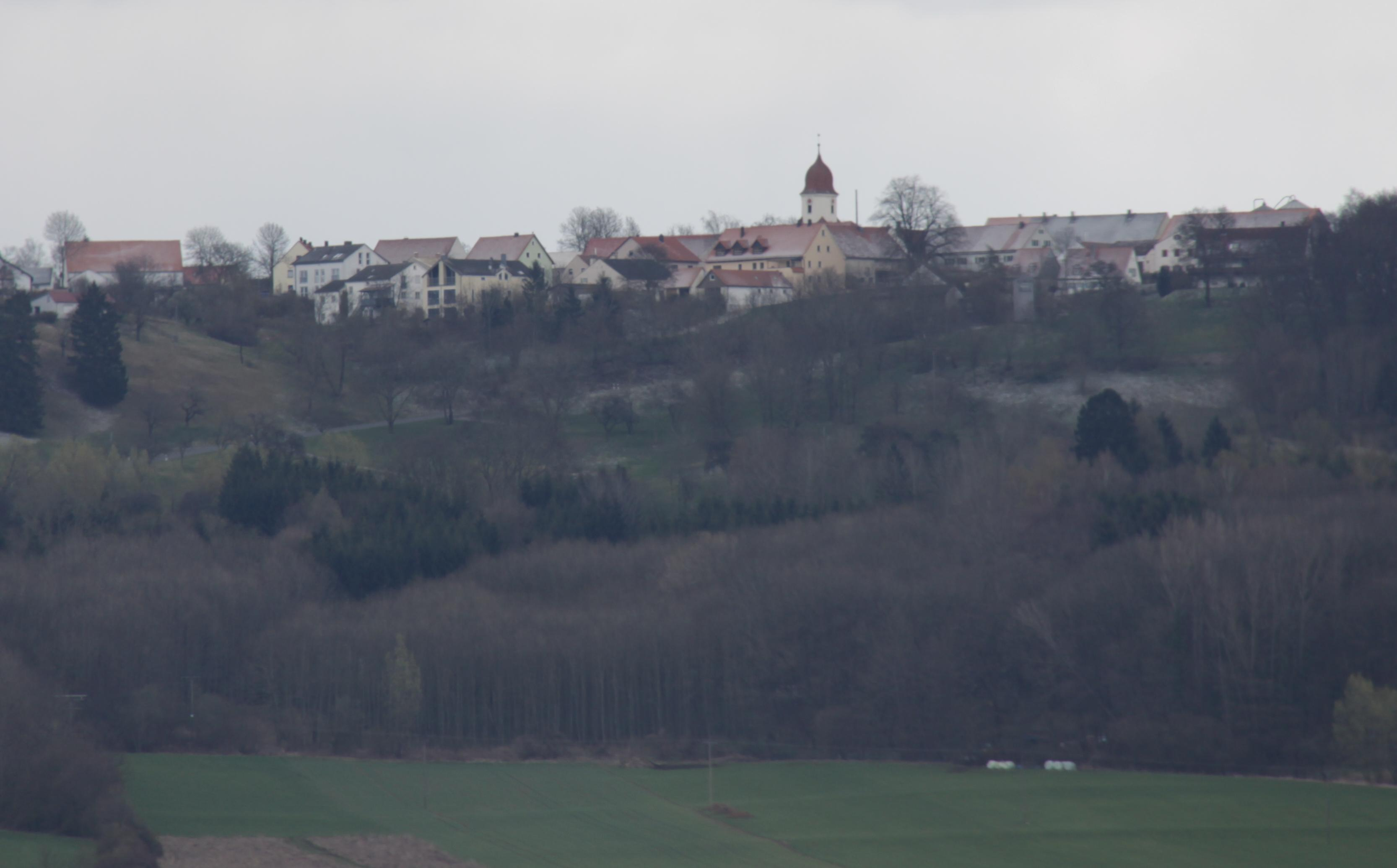 Kaltenbuch